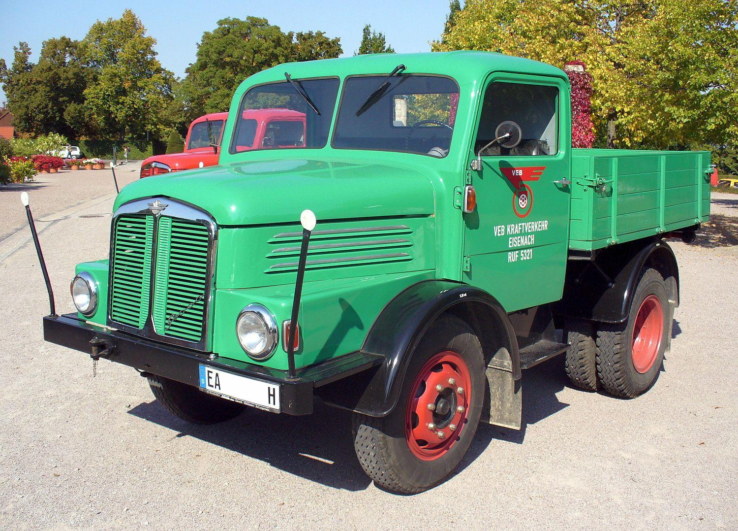 IFA S400 Zugmaschine